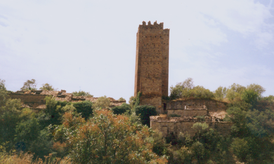 Ruesta (Jacetania)